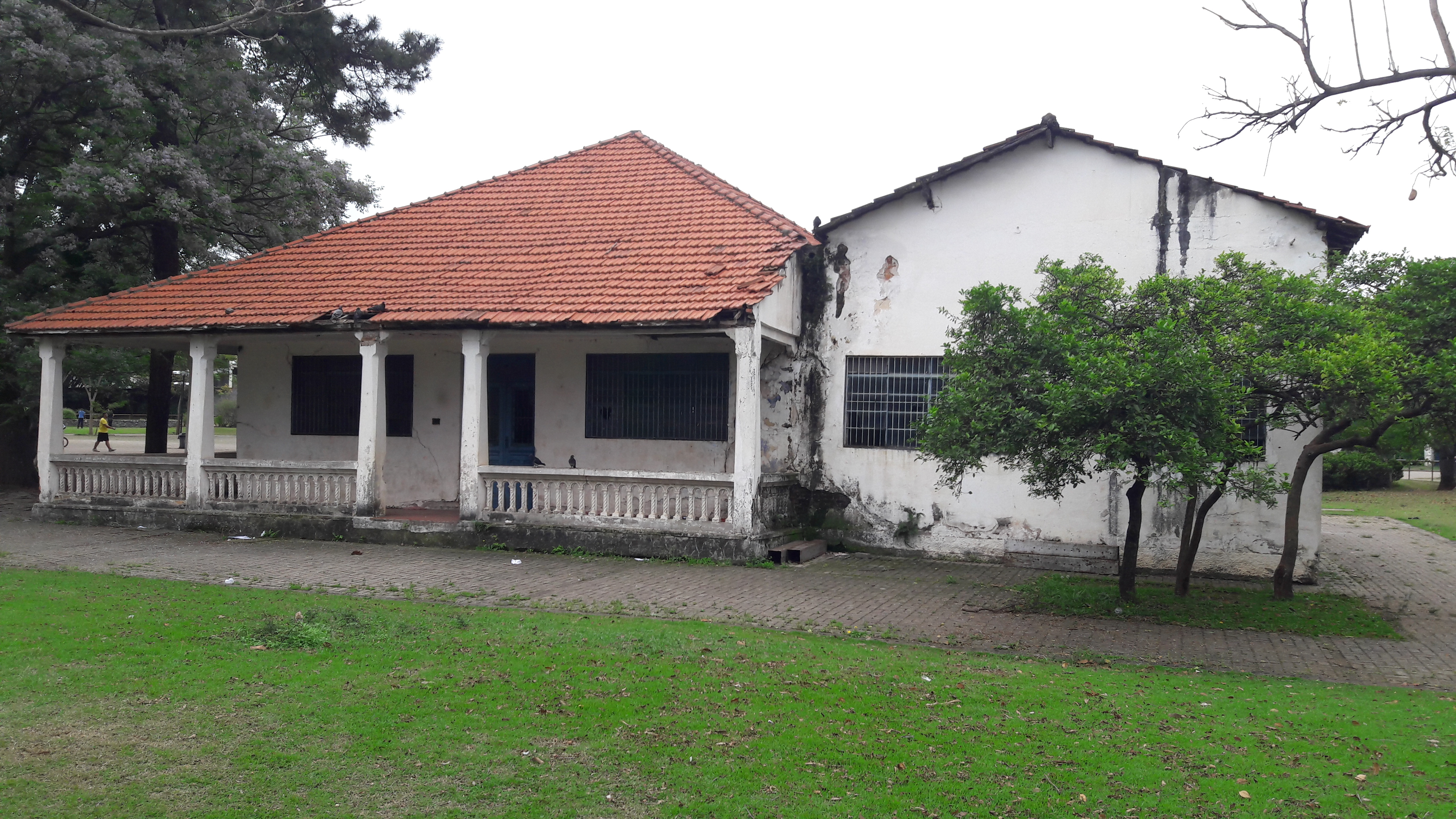 Outro ângulo de um dos casarões do parque do trote na Vila Guilherme, em São Paulo (SP), Brasil.